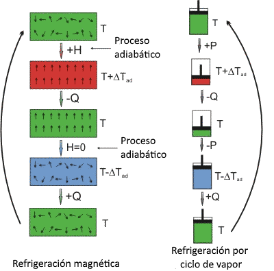 Diagrama mostrando el efecto magnetocalórico usado en refrigeradores magnéticos.